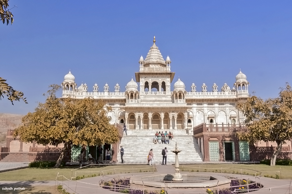 जोधपूरचे महाराणा जसवंत सिंघ यांची समाधी